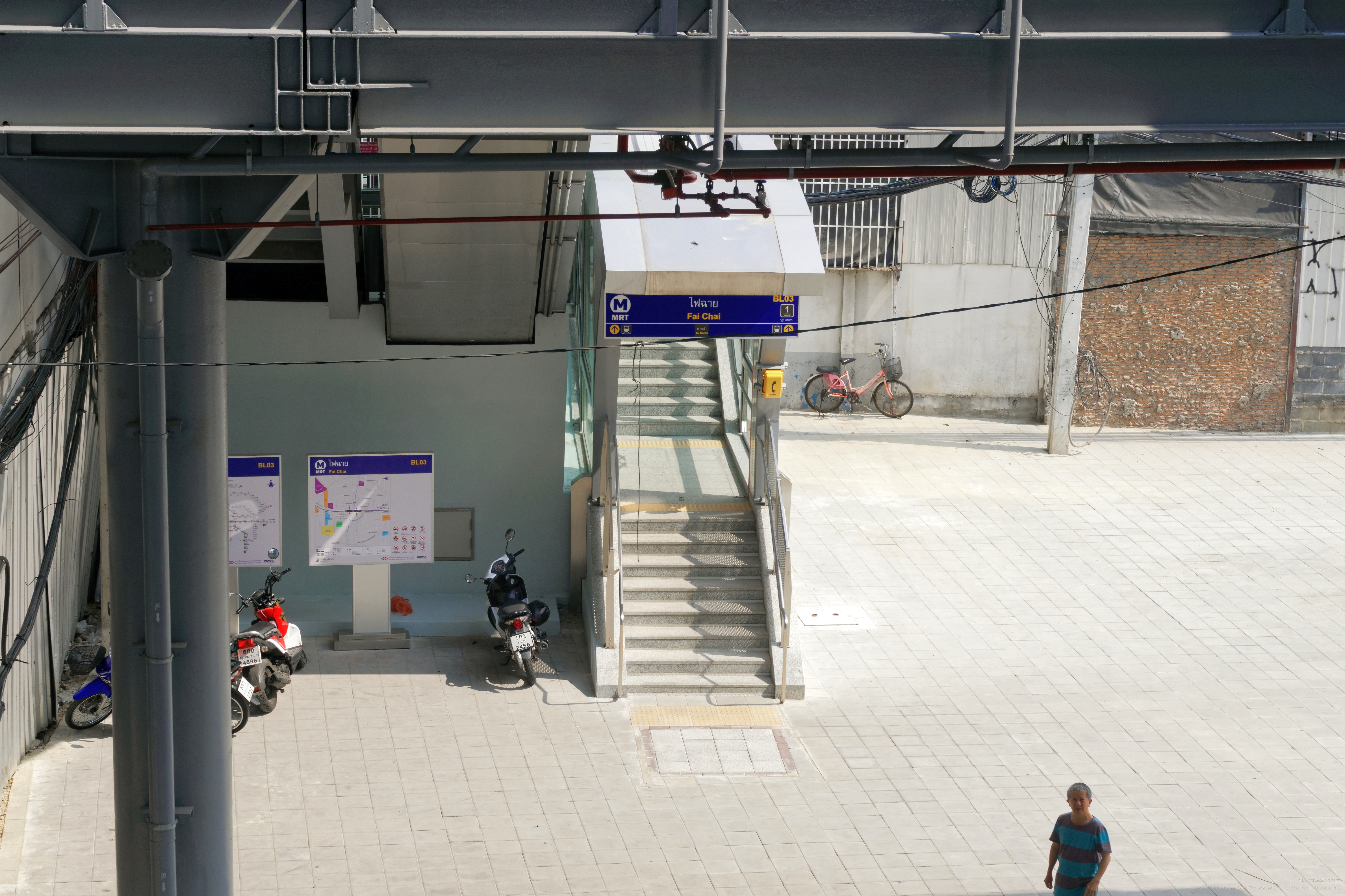 MRT Fai Chai – Exit 1